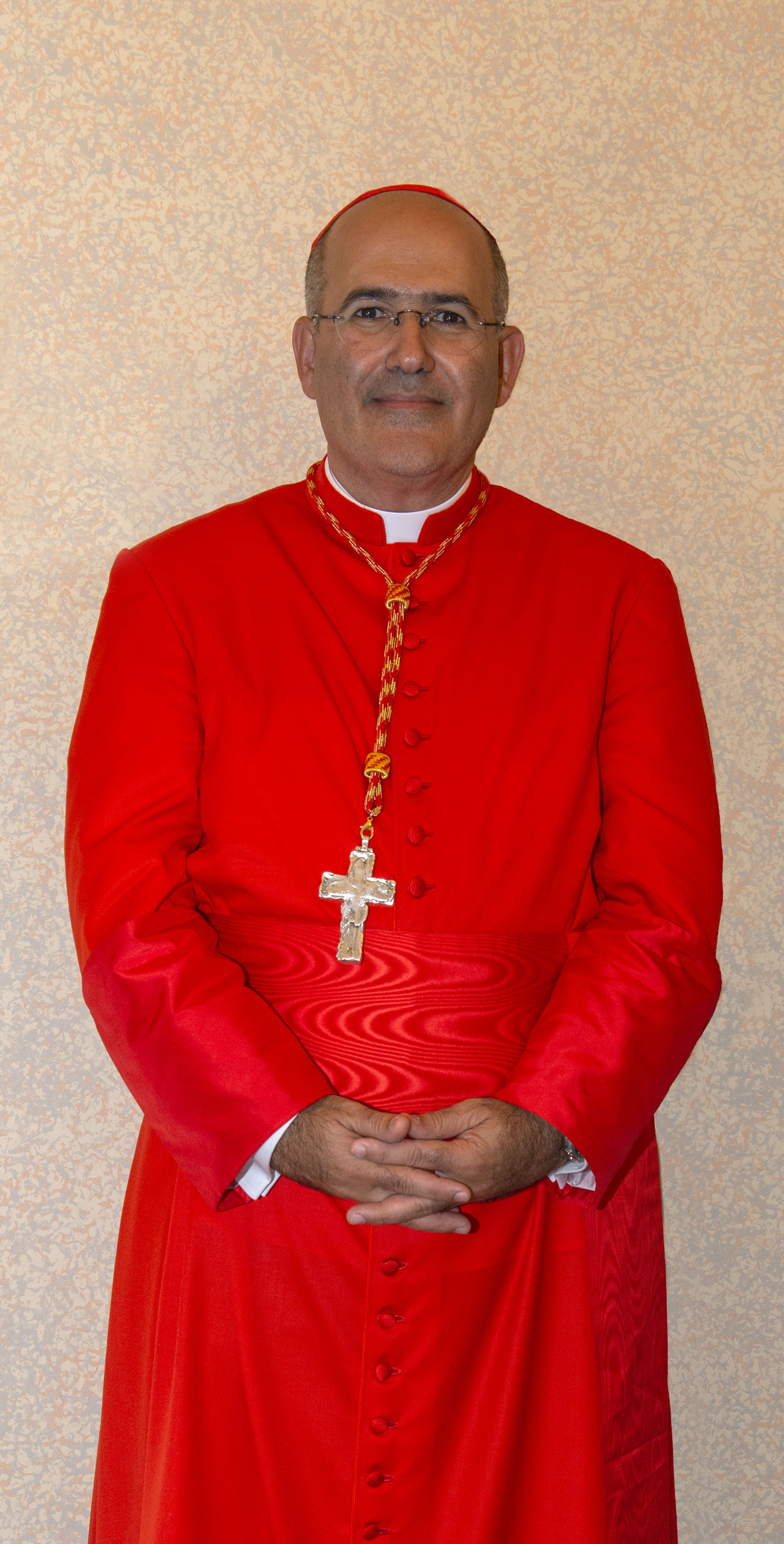 Le Cardinal De Mendonça au lendemain de sa création par le Pape François